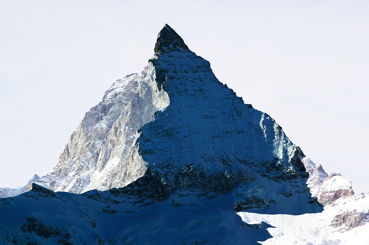 La montagne s’ombre #09, 2005, tirage papier Photo Rag Hahnemühle 107 x 160 cm Mountain Shadow #09, 2005, Rag Paper print Hahnemühle, 43 x 63’’, 107 x 160 cm